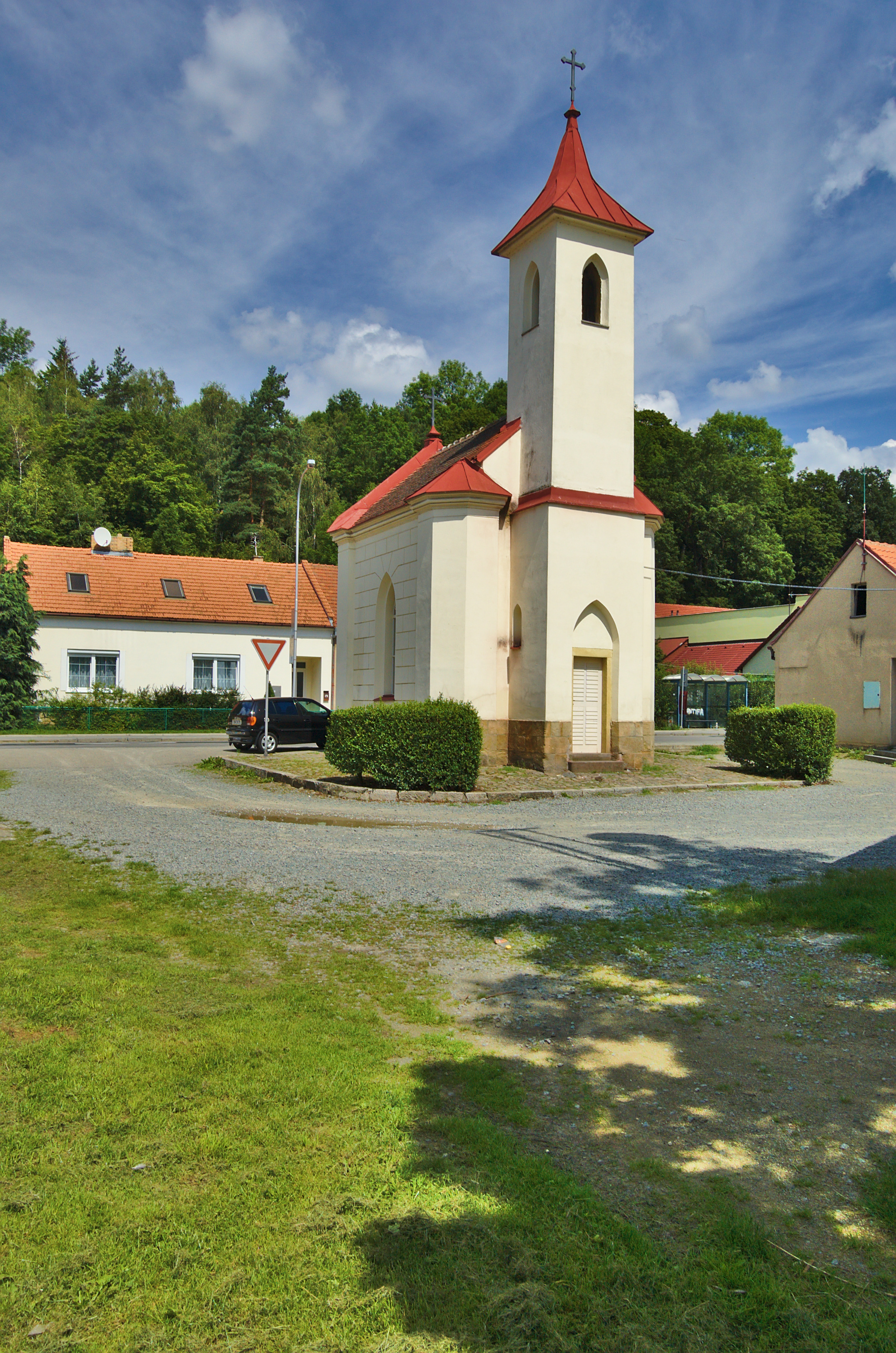 Kaple Panny Marie Bolestné, Boskovice, okres Blansko